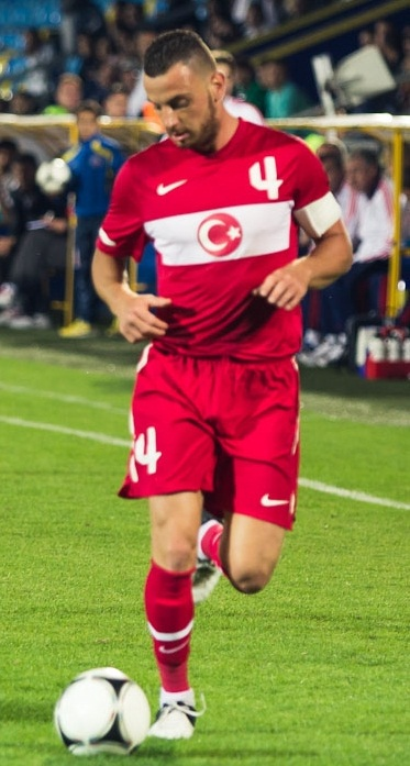 Aykut Demir, Türkiye A2 Milli Takımı formasıyla.